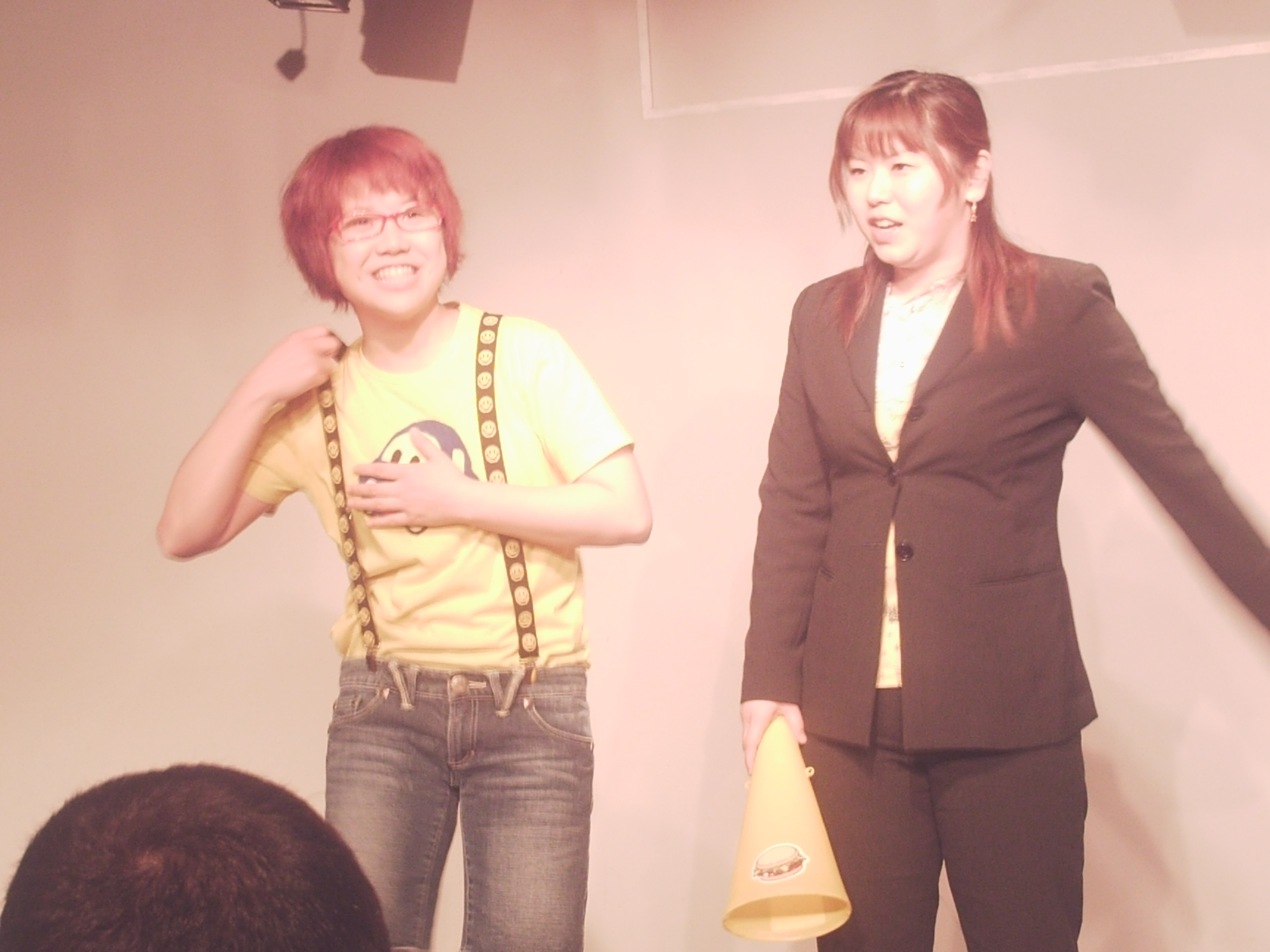 パシンペロン（2010年4月撮影）